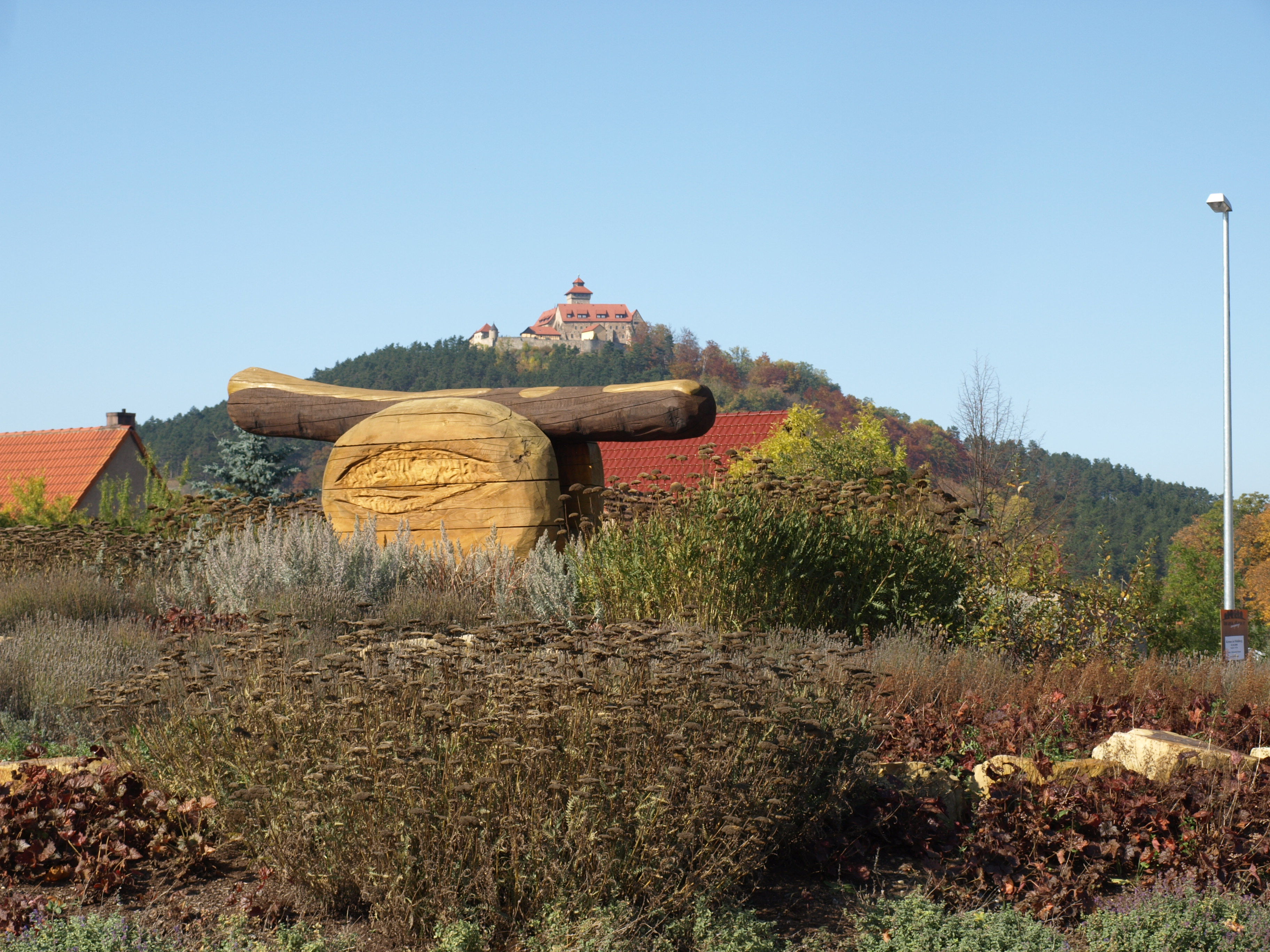 Bratwurstskulptur am östlichen Eingang von Holzhausen (Wachsenburggemeinde) in Thüringen